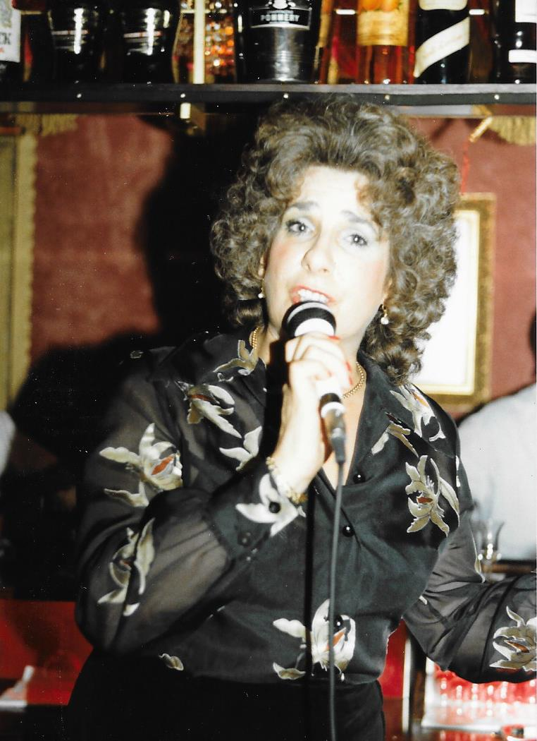 Stella Bos tijdens een optreden in Rotterdam.